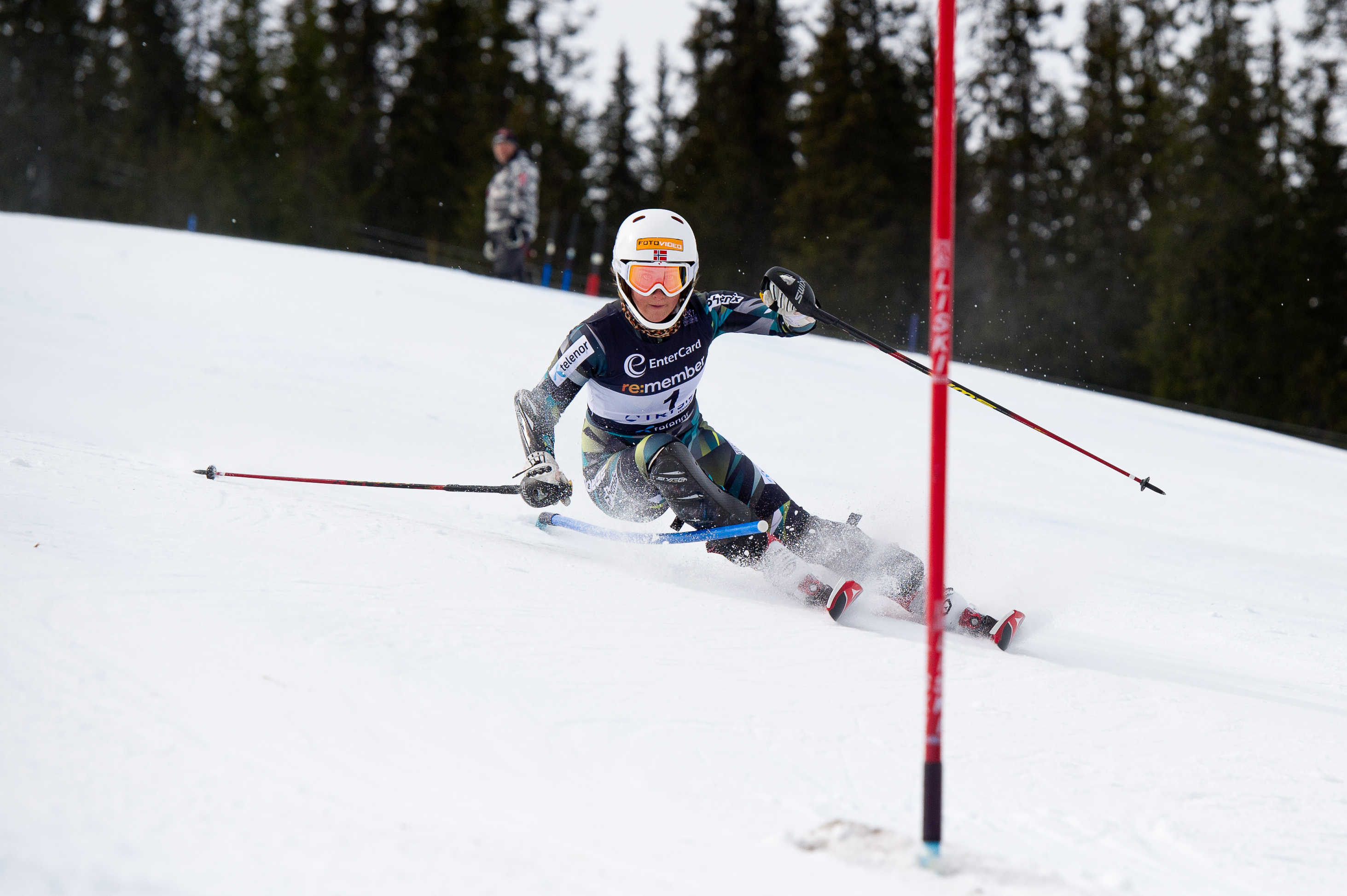 I NM i slalåm i Trysil 27. mars tok Lotte Smiseth Sejersted sitt 5. strake NM-gull. Gratulerer!